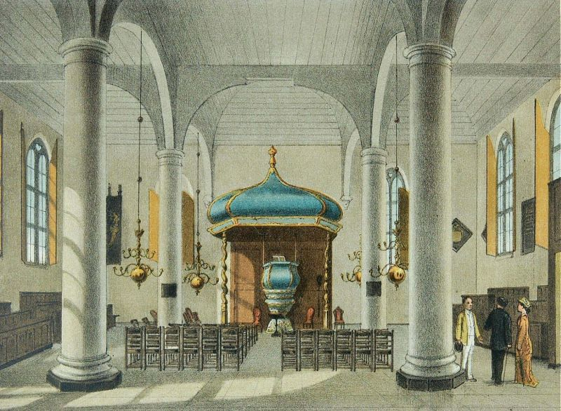 Litho. Kleurenlitho naar een oorspronkelijke aquarel van Rappard.. Het interieur van de Portugese buitenkerk in Batavia